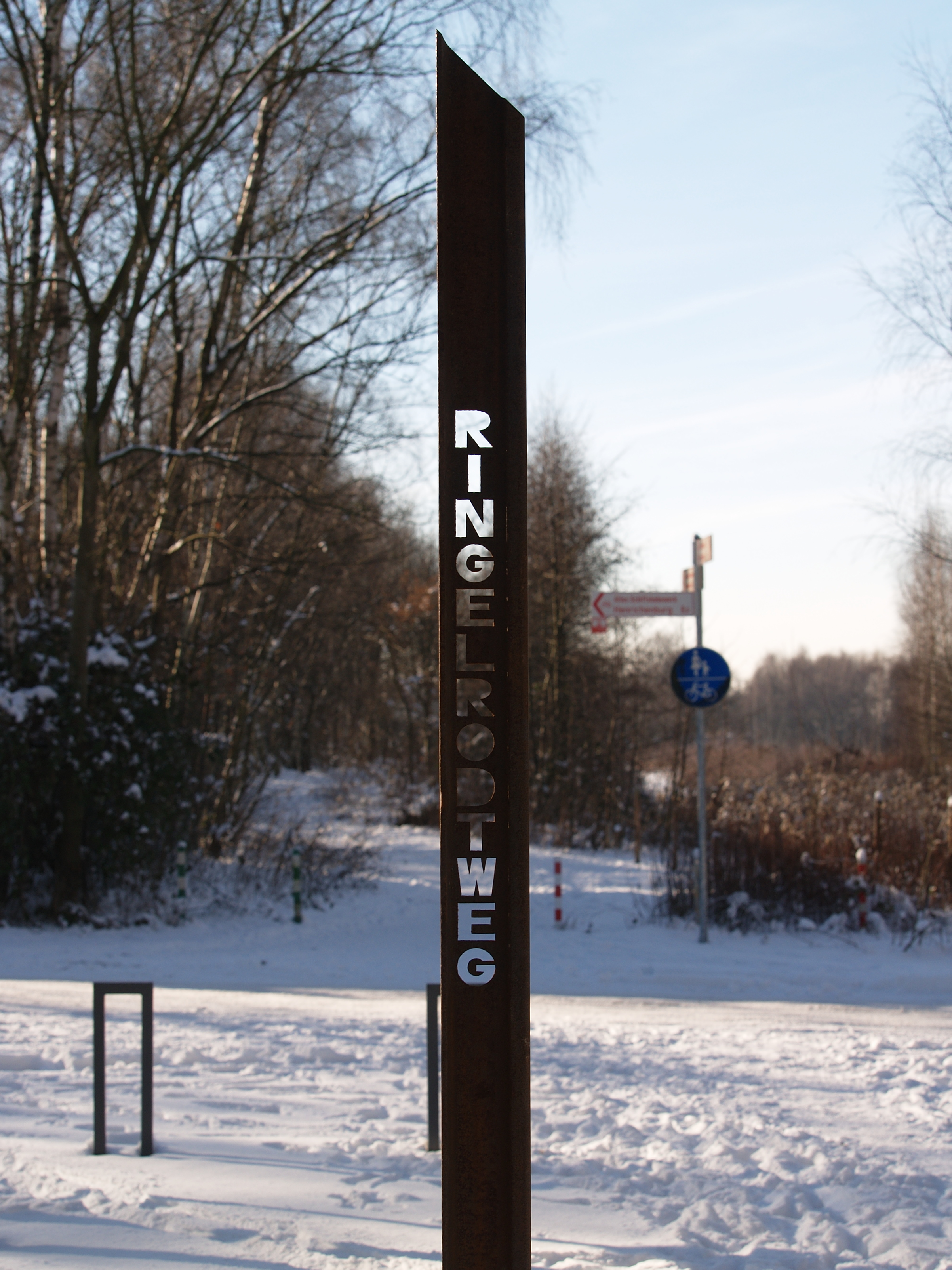 Markierung eines Abgangs an der König-Ludwig-Trasse